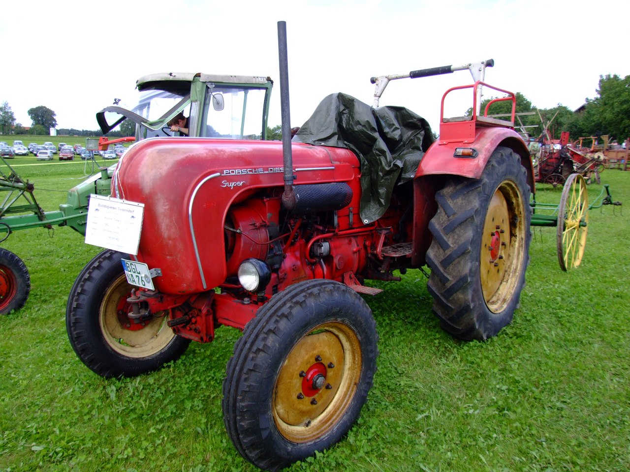 Porsche-Diesel Super F319 mit 40 PS, Baujahr 1963